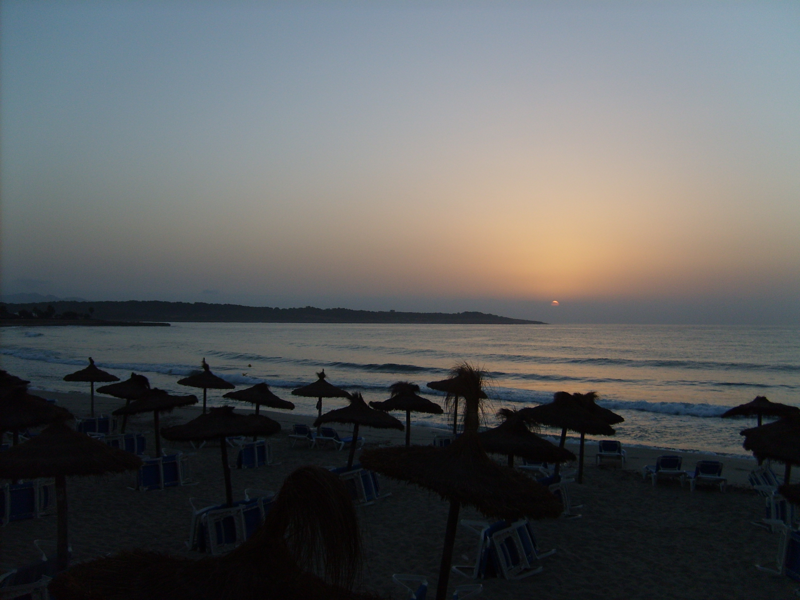 Sonnenaufgang über Punta de n'Amer von S´illot aus gesehen